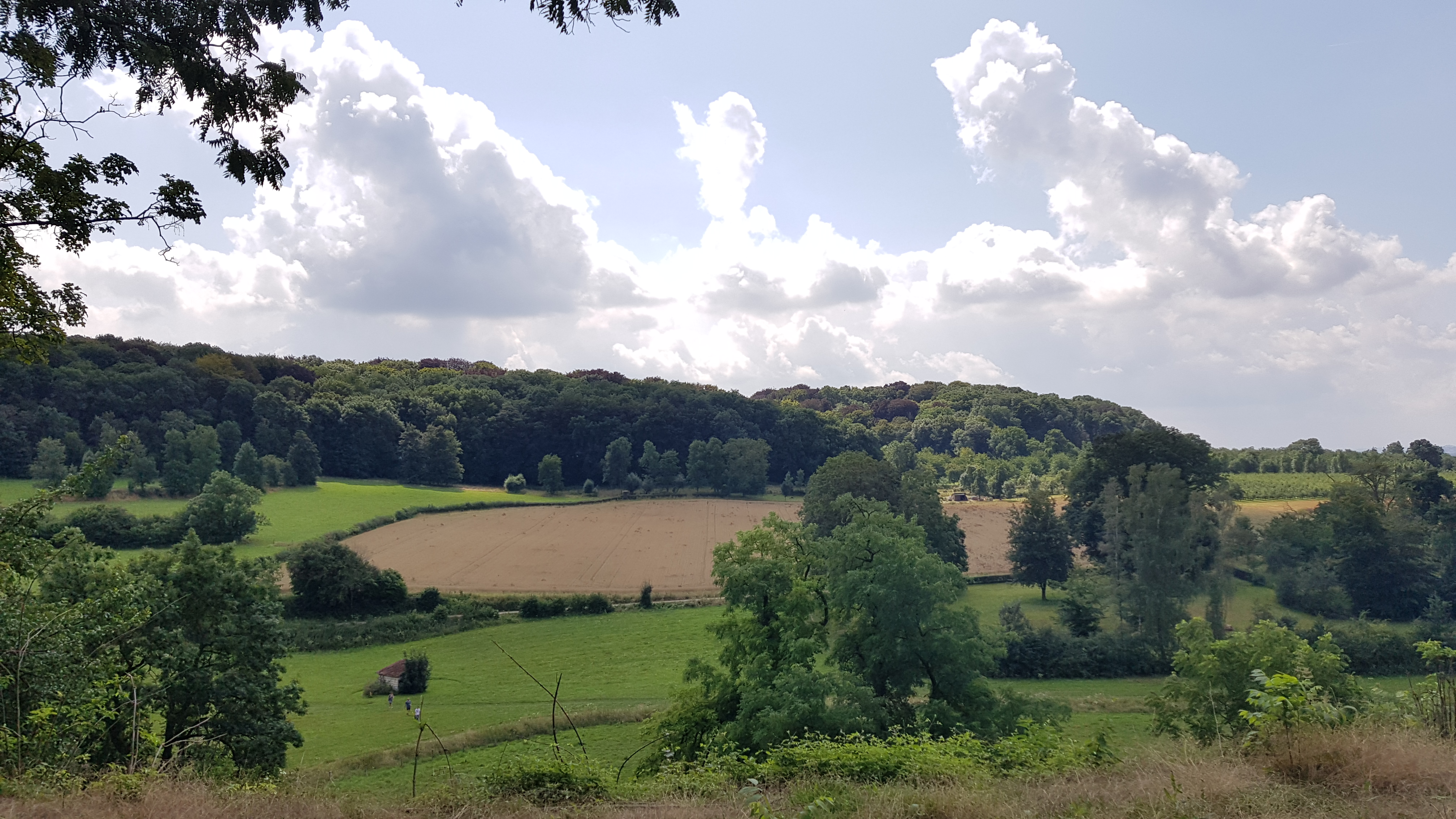 uitzicht vanaf Huis De Beuk in het Savelsbos, Gronsveld, Nederland